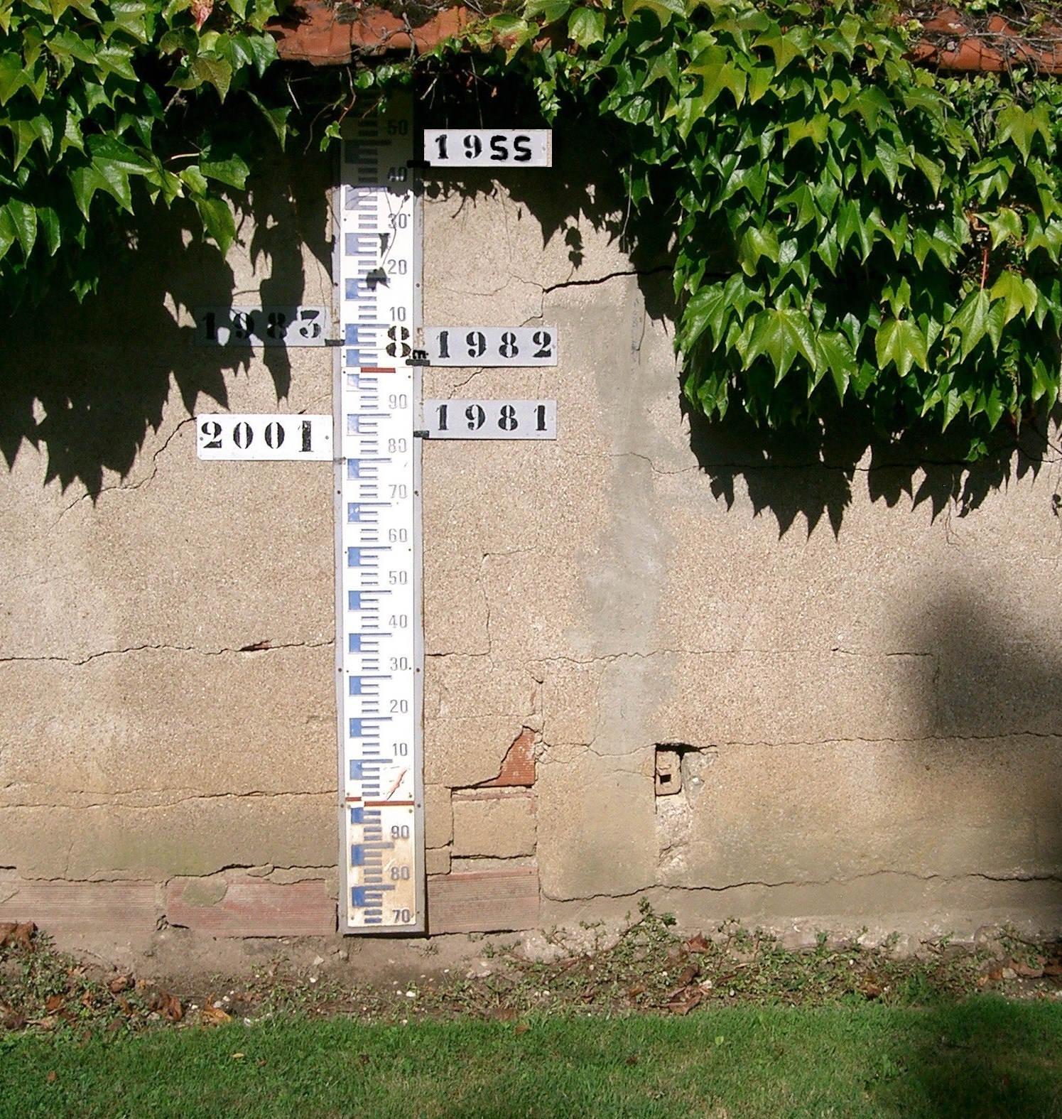 Saône -_échelle_des_inondations à Ecuelles (Saône et Loire - France) Inondation record en 1955